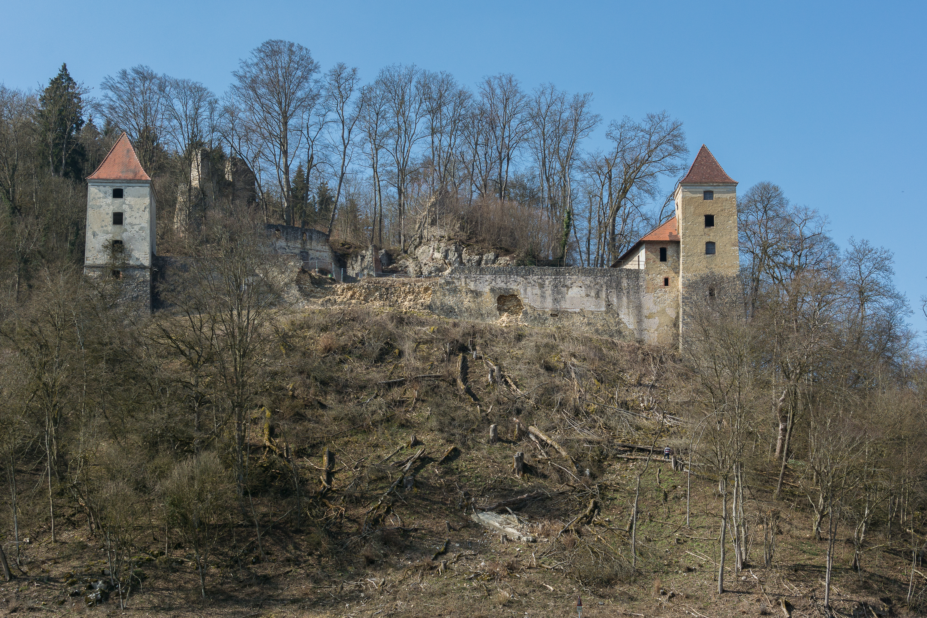 Die Ruine der Burg Kaltenburg im Lonetal bei Hürben.